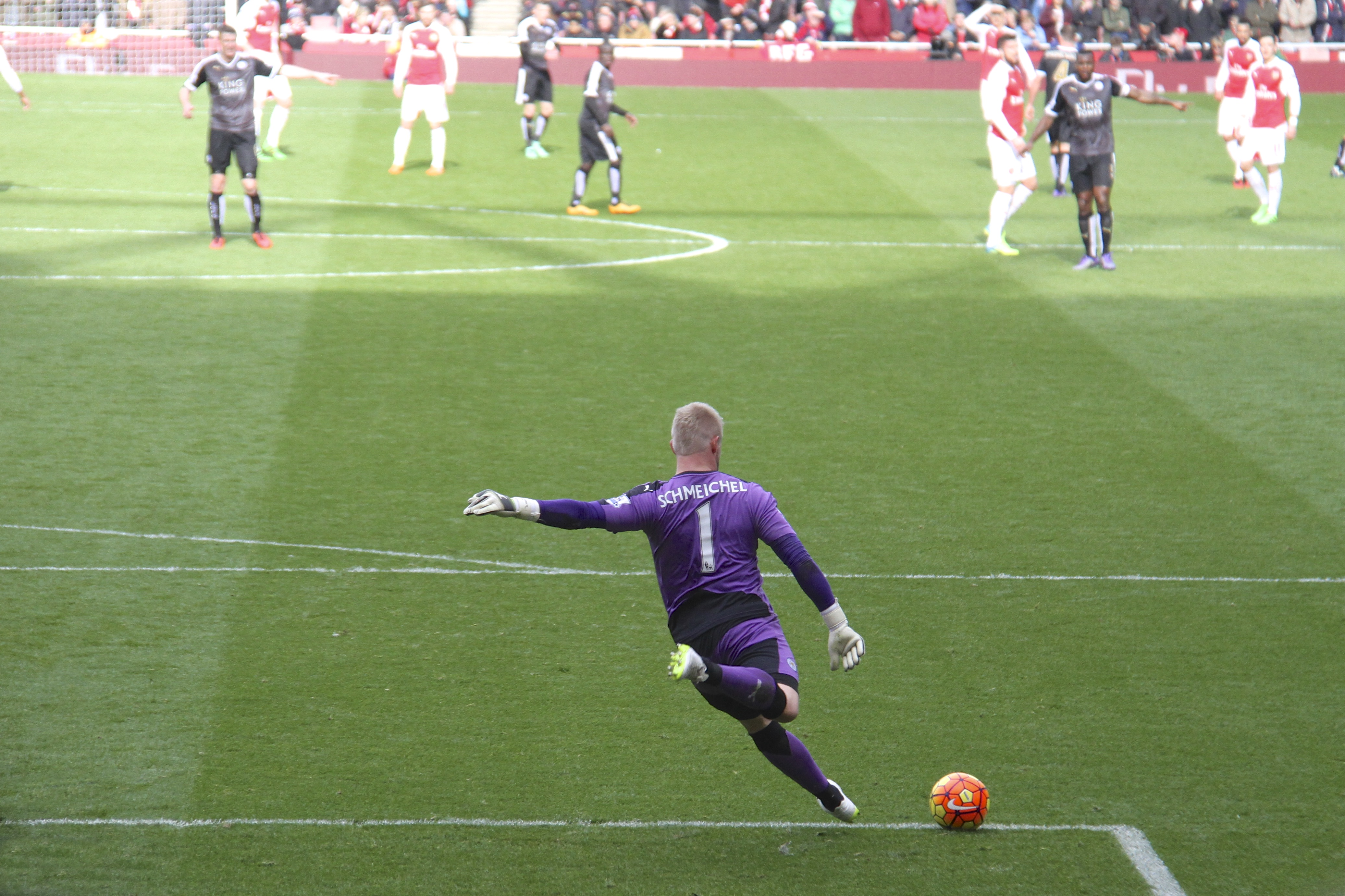 Kasper Schmeichel